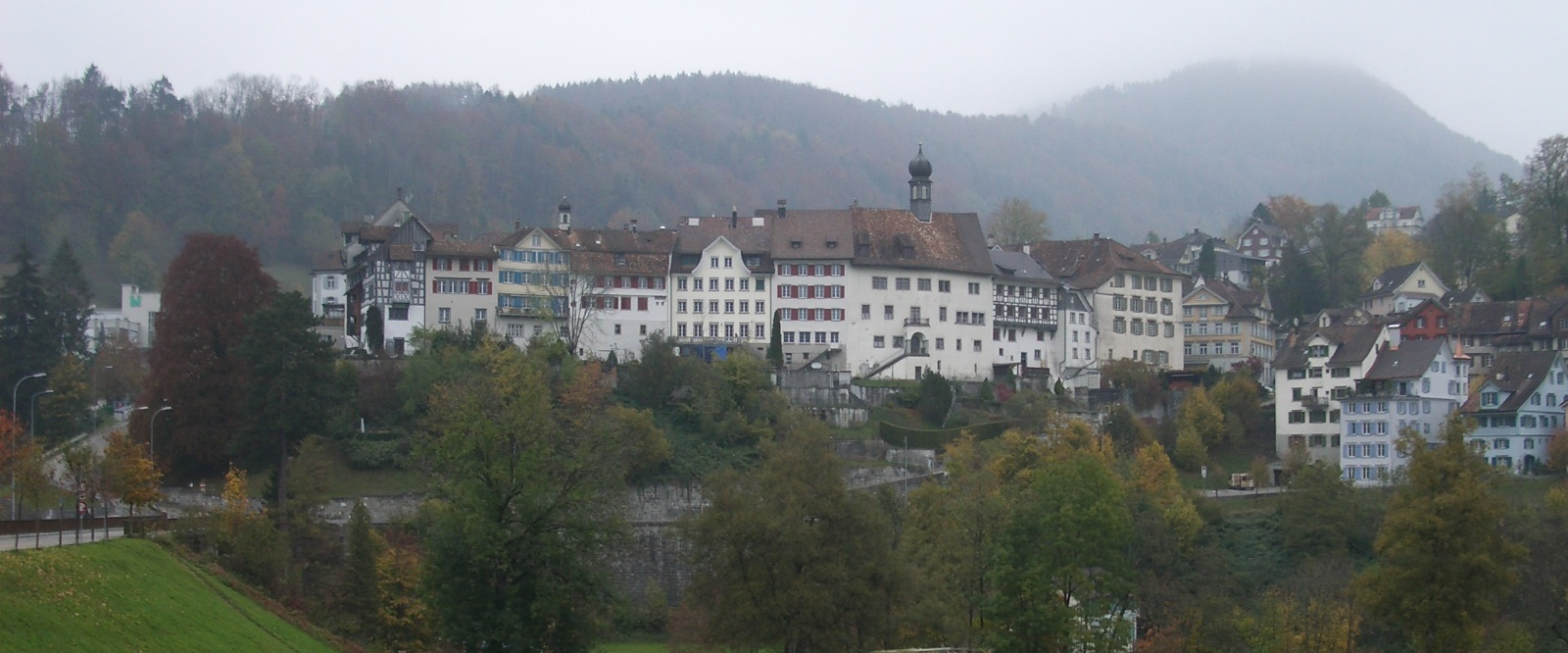 Lichtensteig SG, Switzerland